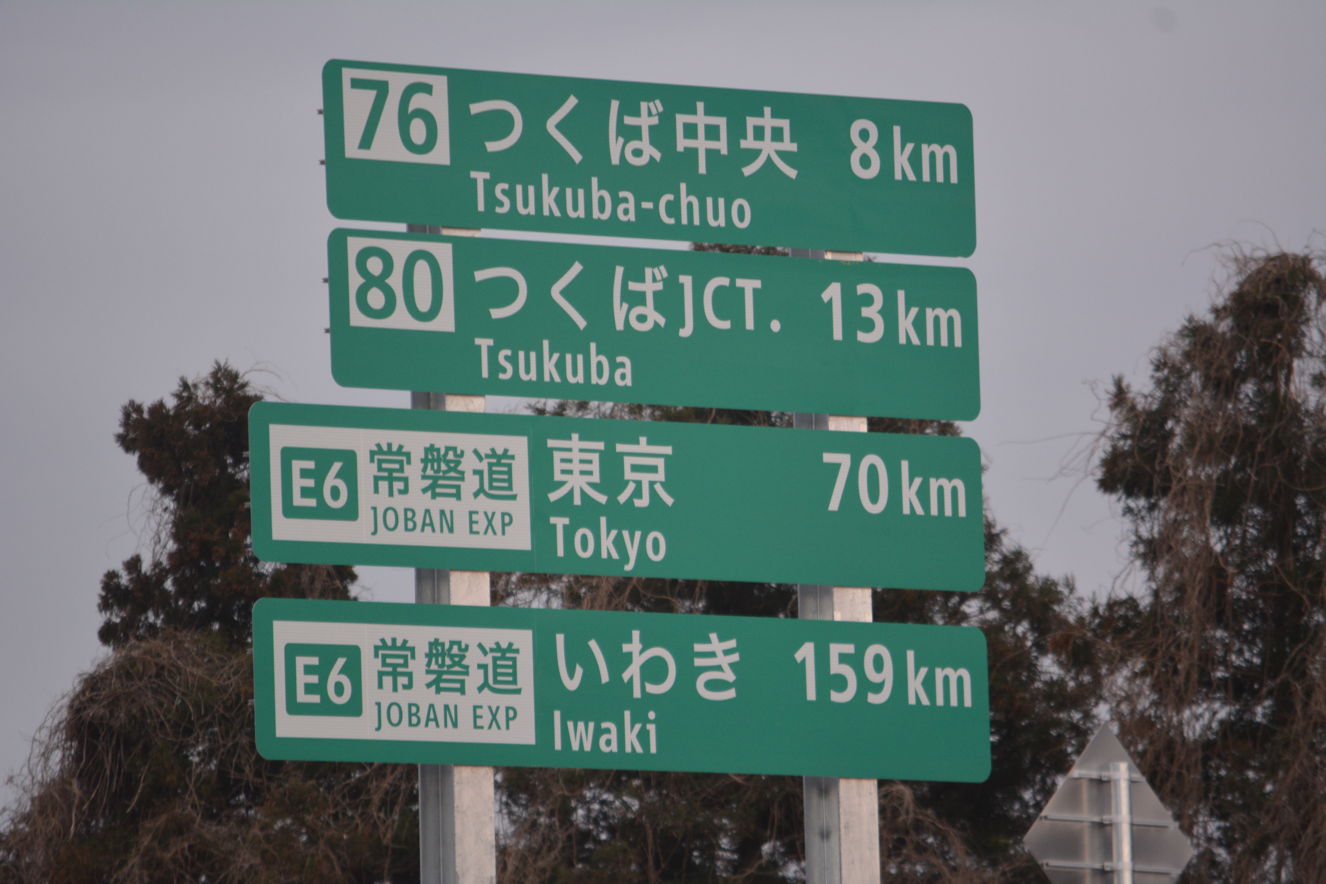 日本の高速道路における高速道路番号が記された方面及び距離(106-B)の案内標識。圏央道。つくば市。